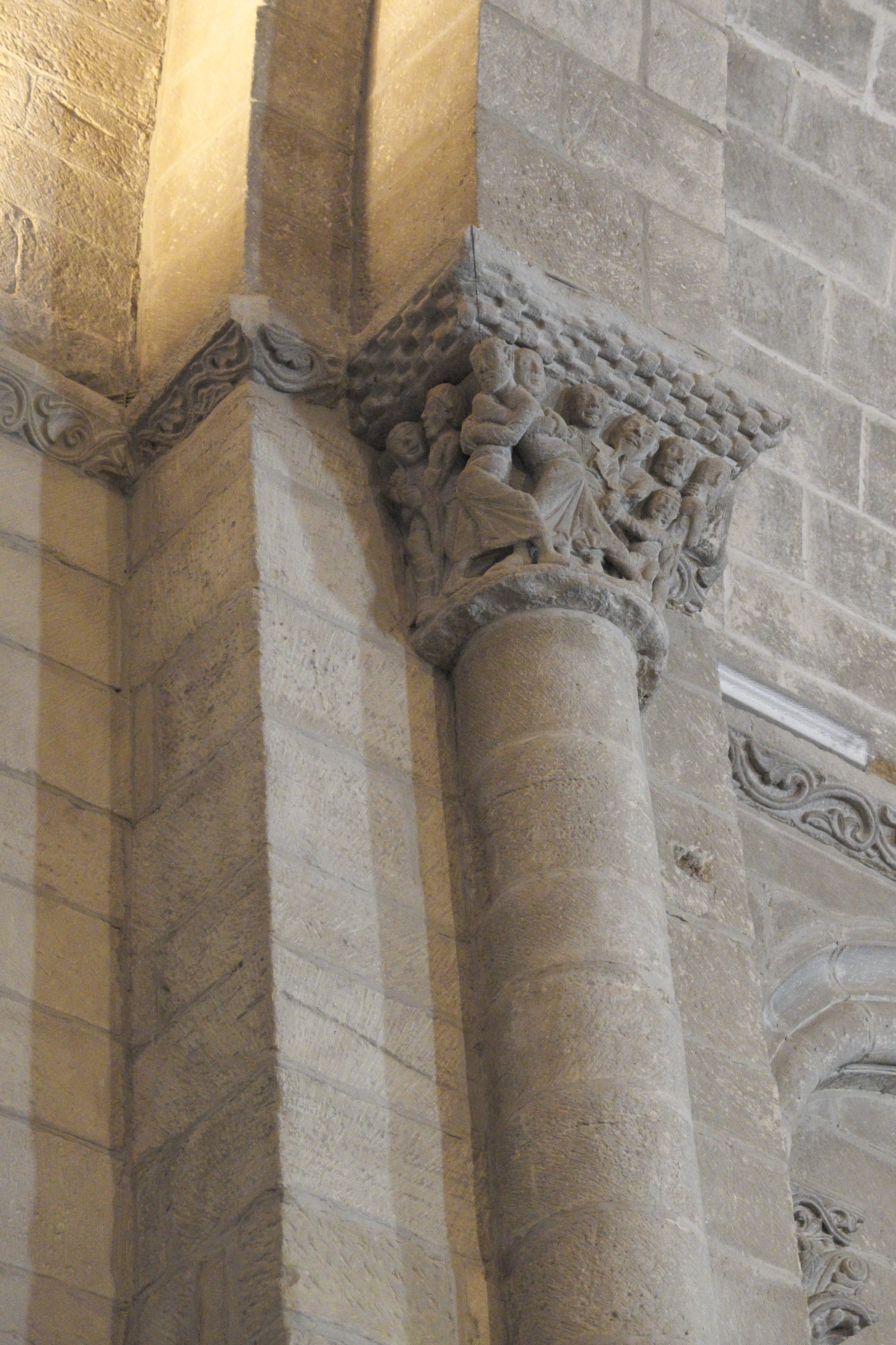 Katholische Pfarrkirche Santa María la Mayor in Uncastillo in der Provinz Saragossa (Aragón/Spanien), Kapitell